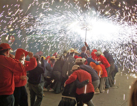 Correfoc de Dimonis de l'Avern